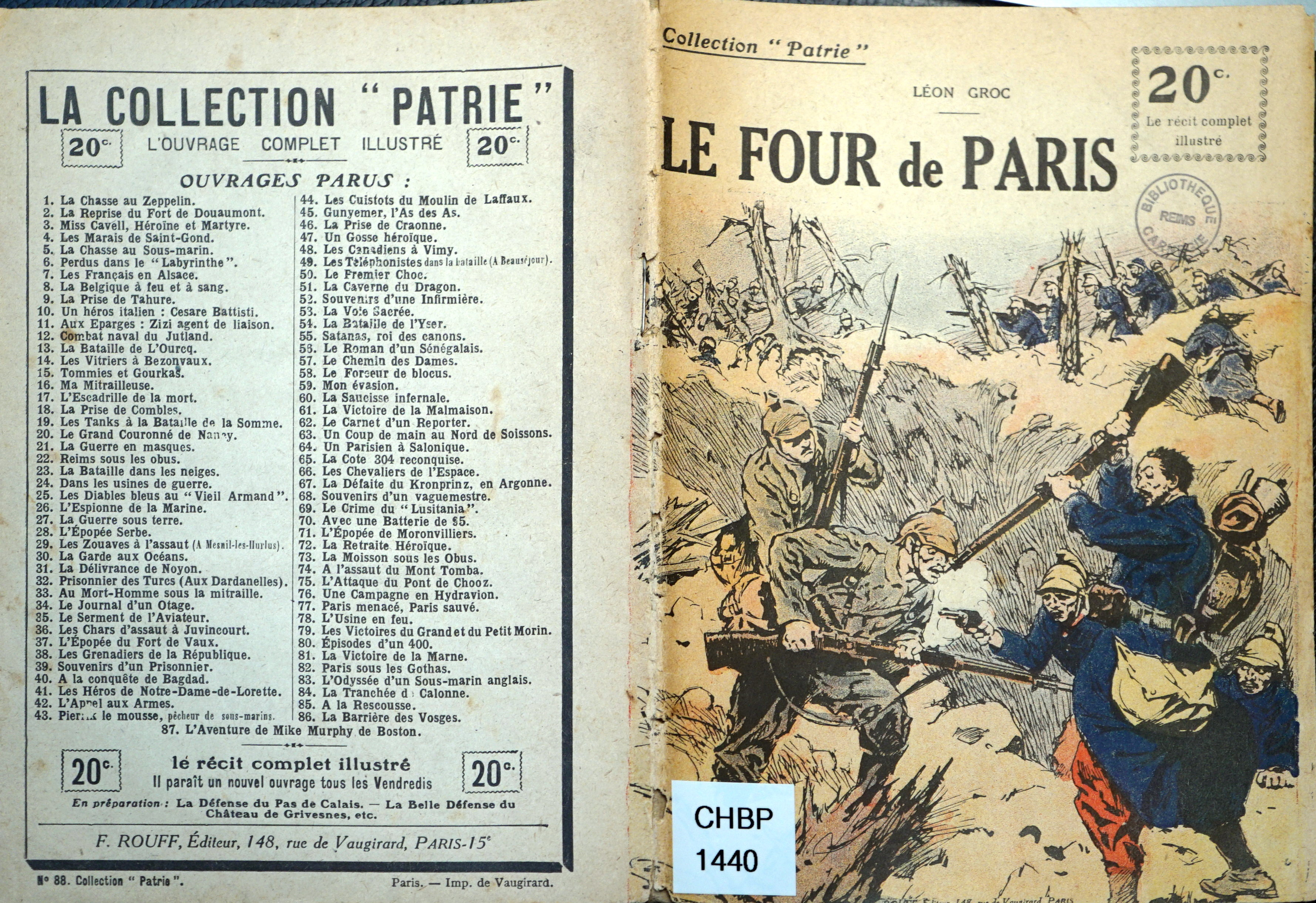 exemplaire de la "Collection Patrie" sur les éventements au " Four de Paris" .